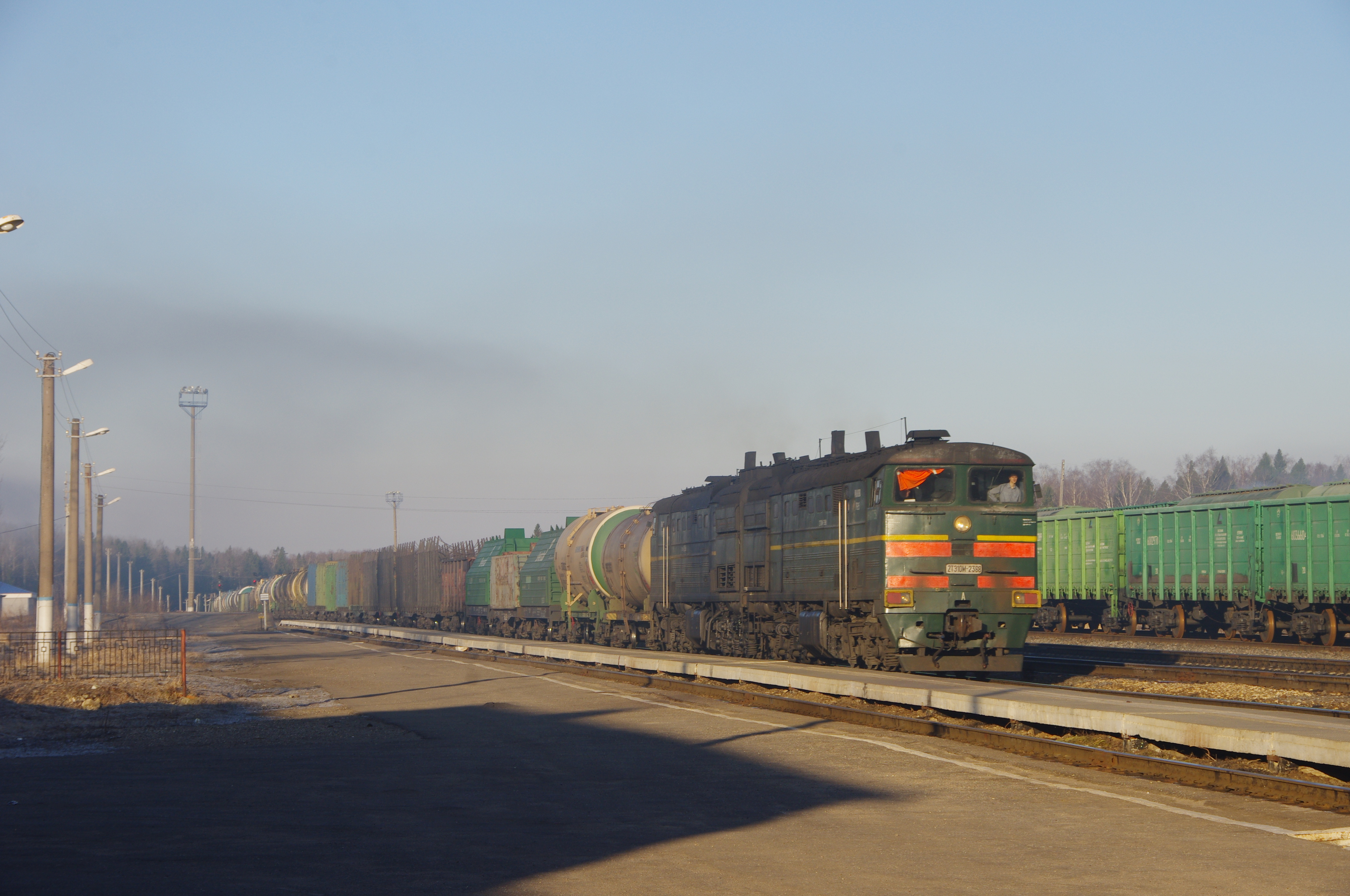 Тепловоз 2ТЭ10М-2388 с грузовым поездом, станция Ермолино, Ивановская область, Россия